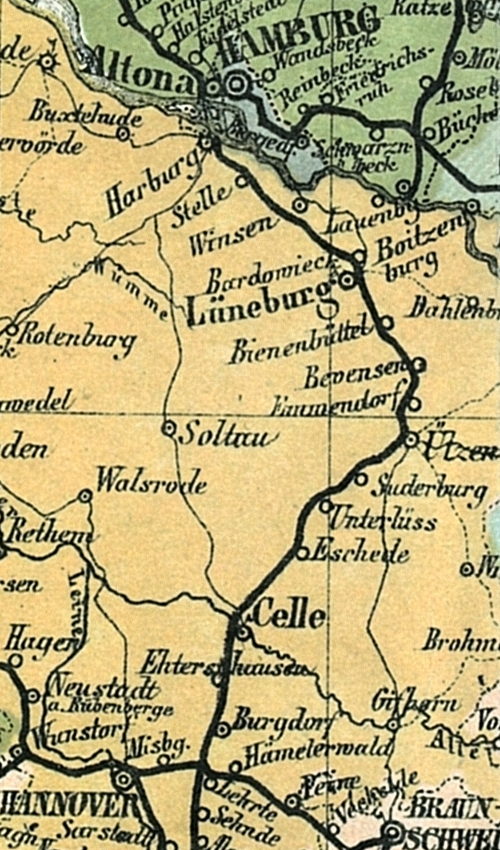 Ausschnitt Hamburg-Hannover aus der Bahnkarte_Deutschland_1861